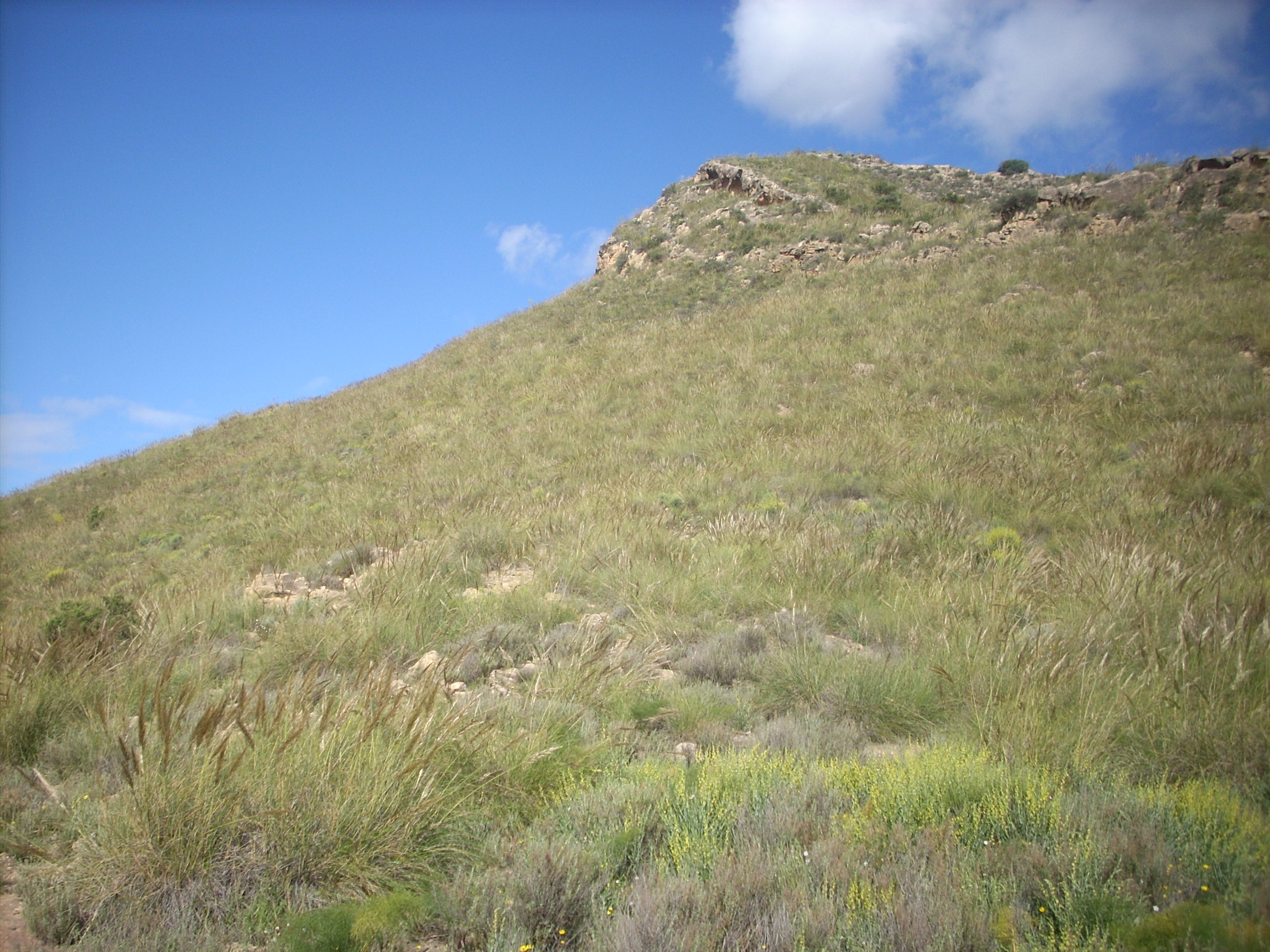 Vista del Picacho de Tercia